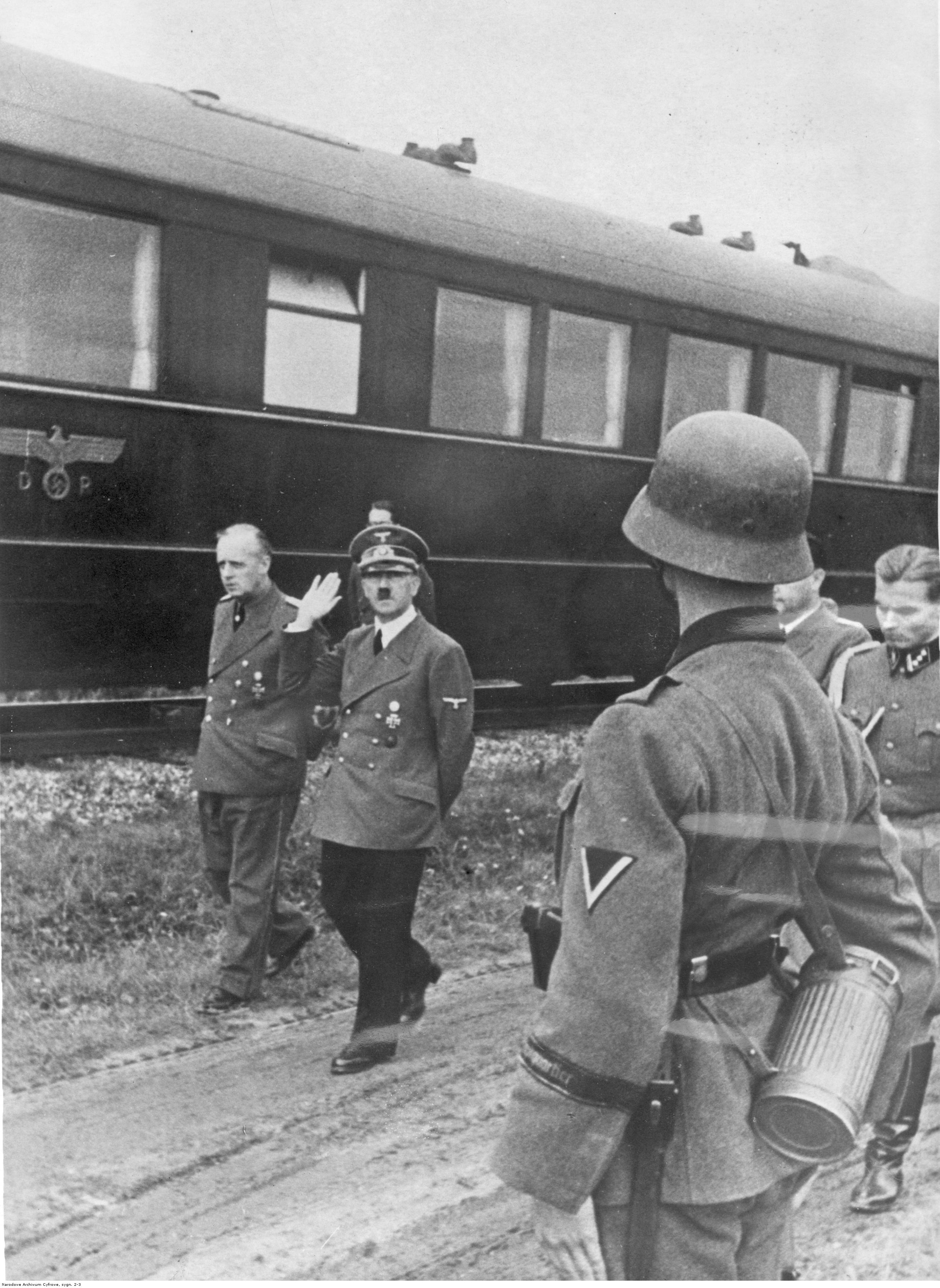 Adolf Hitler (2 z lewej) i Joachim von Ribbentrop (1 z lewej) przed pociągiem będącym kwaterą główną w czasie kampanii wrześniowej.